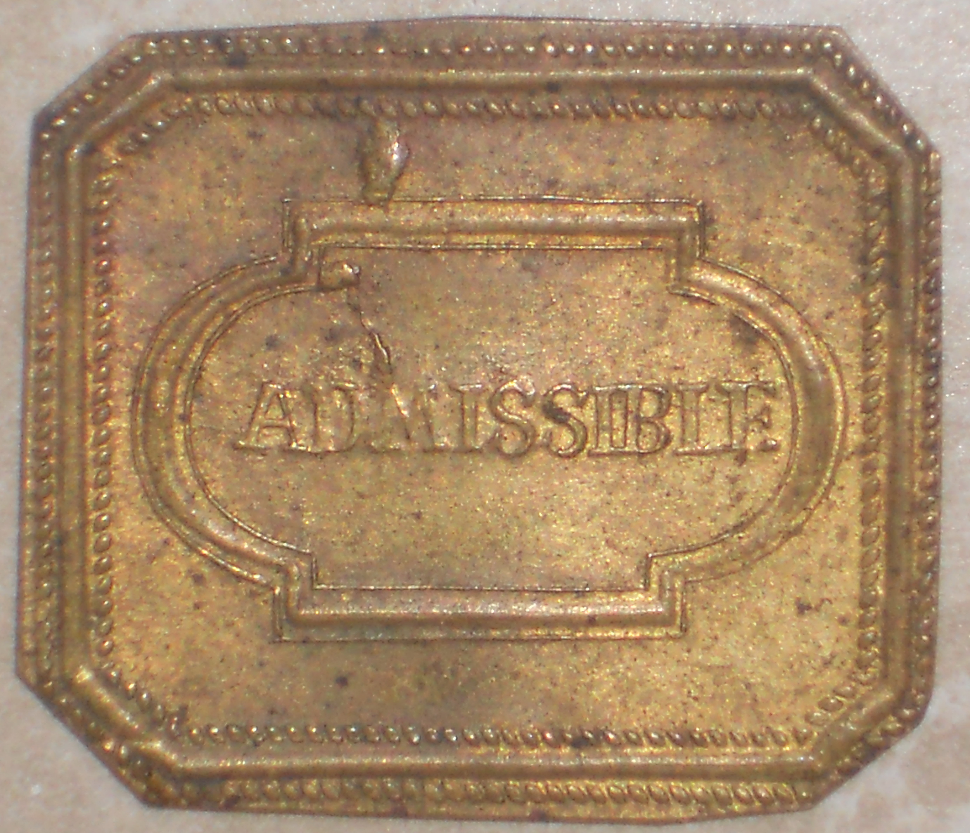 Abendmahlsmarke Berlin Schrift: ADMISSIBLE (zugelassen)